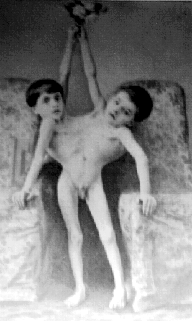 die Tocci-Zwillinge, vermutlich während ihrer Amerikatournee